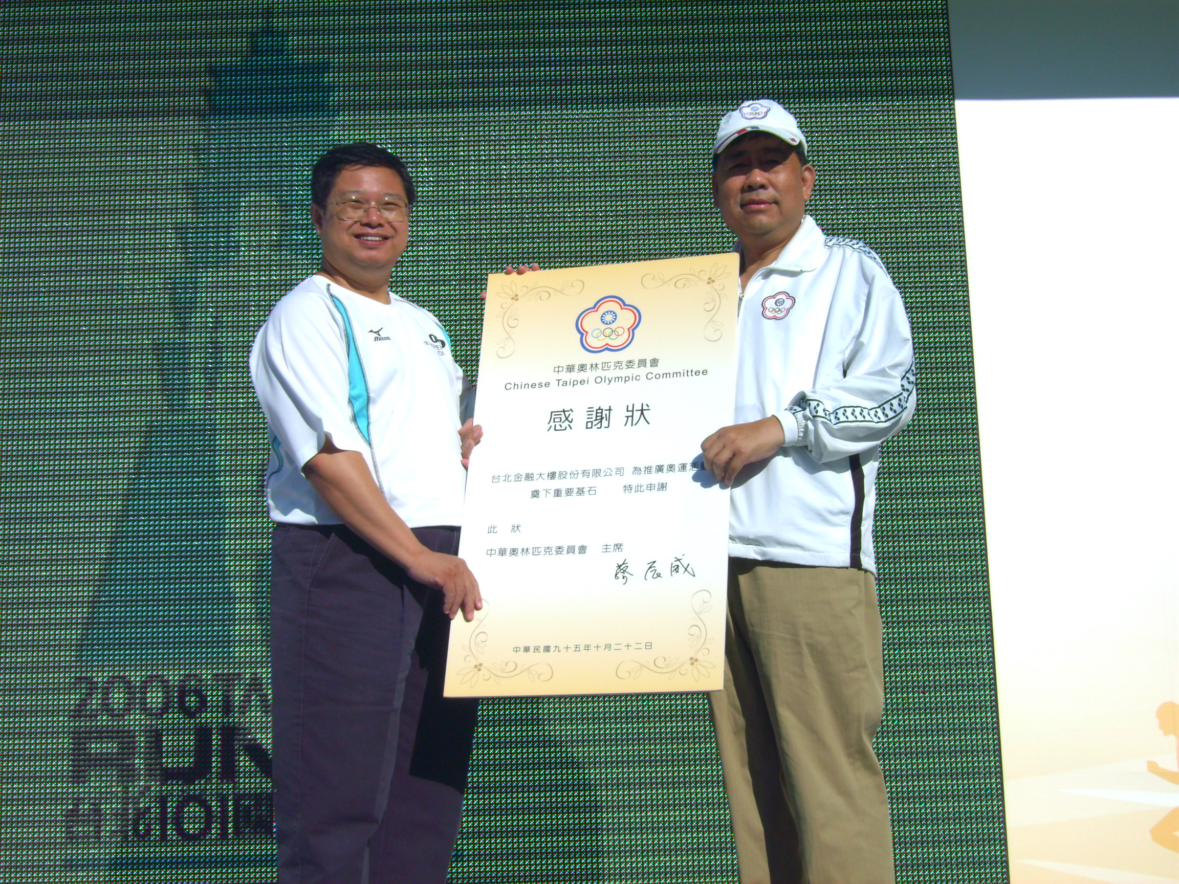 2006 Taipei 101 Run Up: 中華奧會副主席蔡賜爵頒贈感謝狀給台北101總經理林鴻明